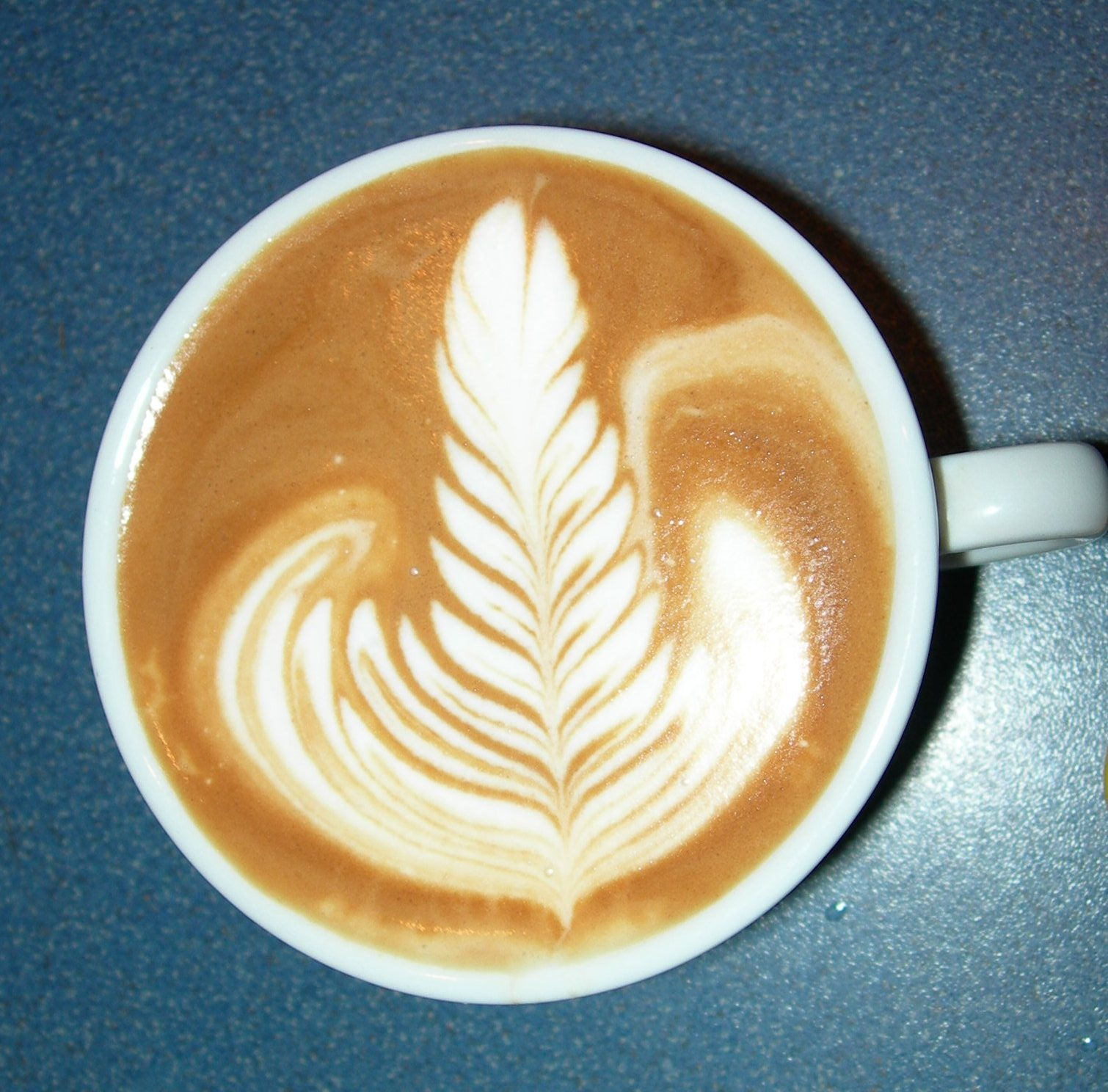 Latté art cappuccinu, vytvořené v Kavárně u Zlatého korálku mistrem světa v latté art Jackem Hannou